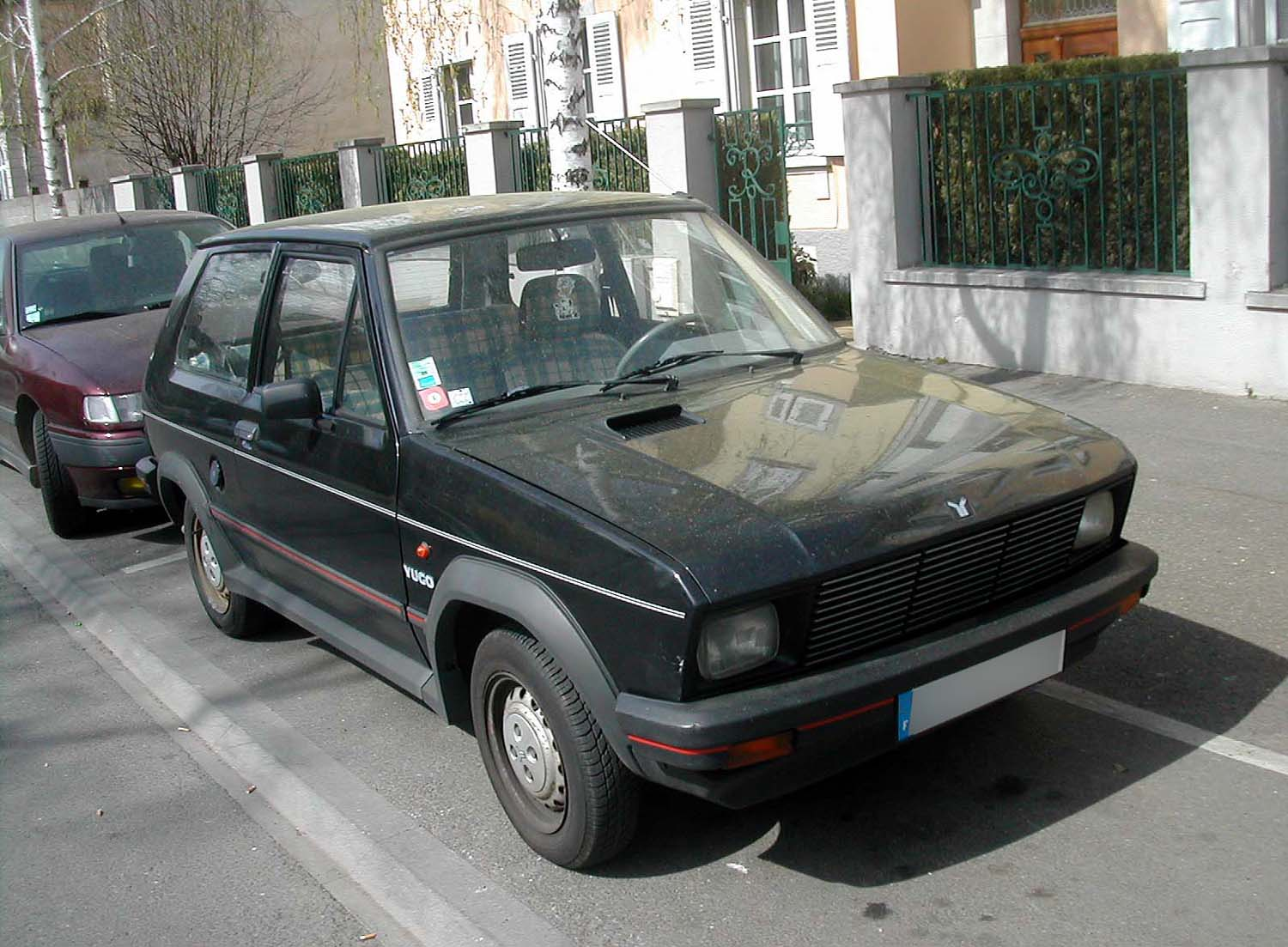 Une Yugo 45S en Alsace en 2005 (photo mise à ma disposition par Roulax).